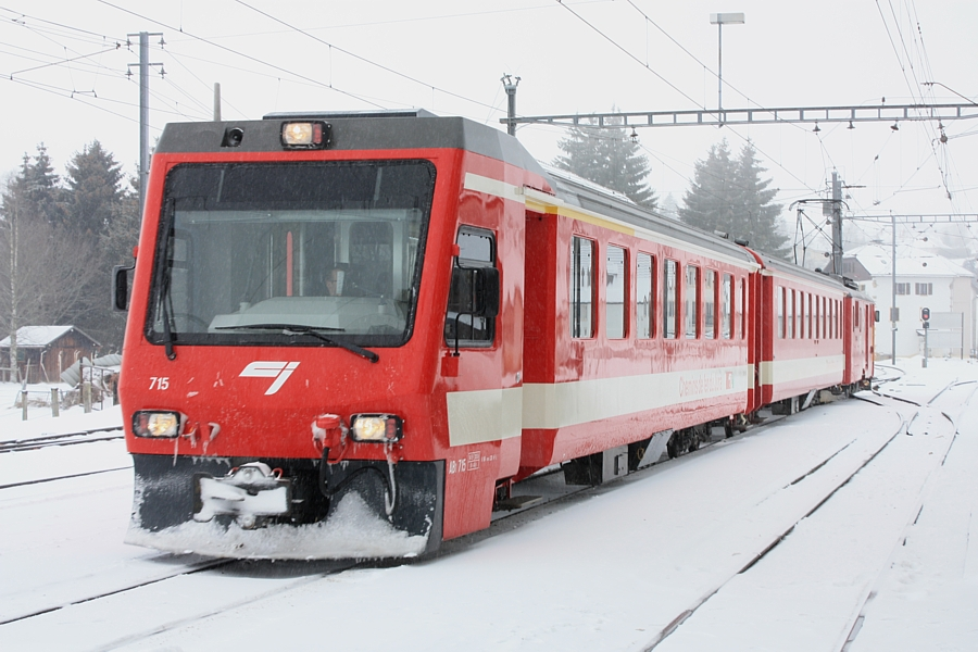 ABt 715 des Chemins de fer du Jura (CJ) en gare du Noirmont